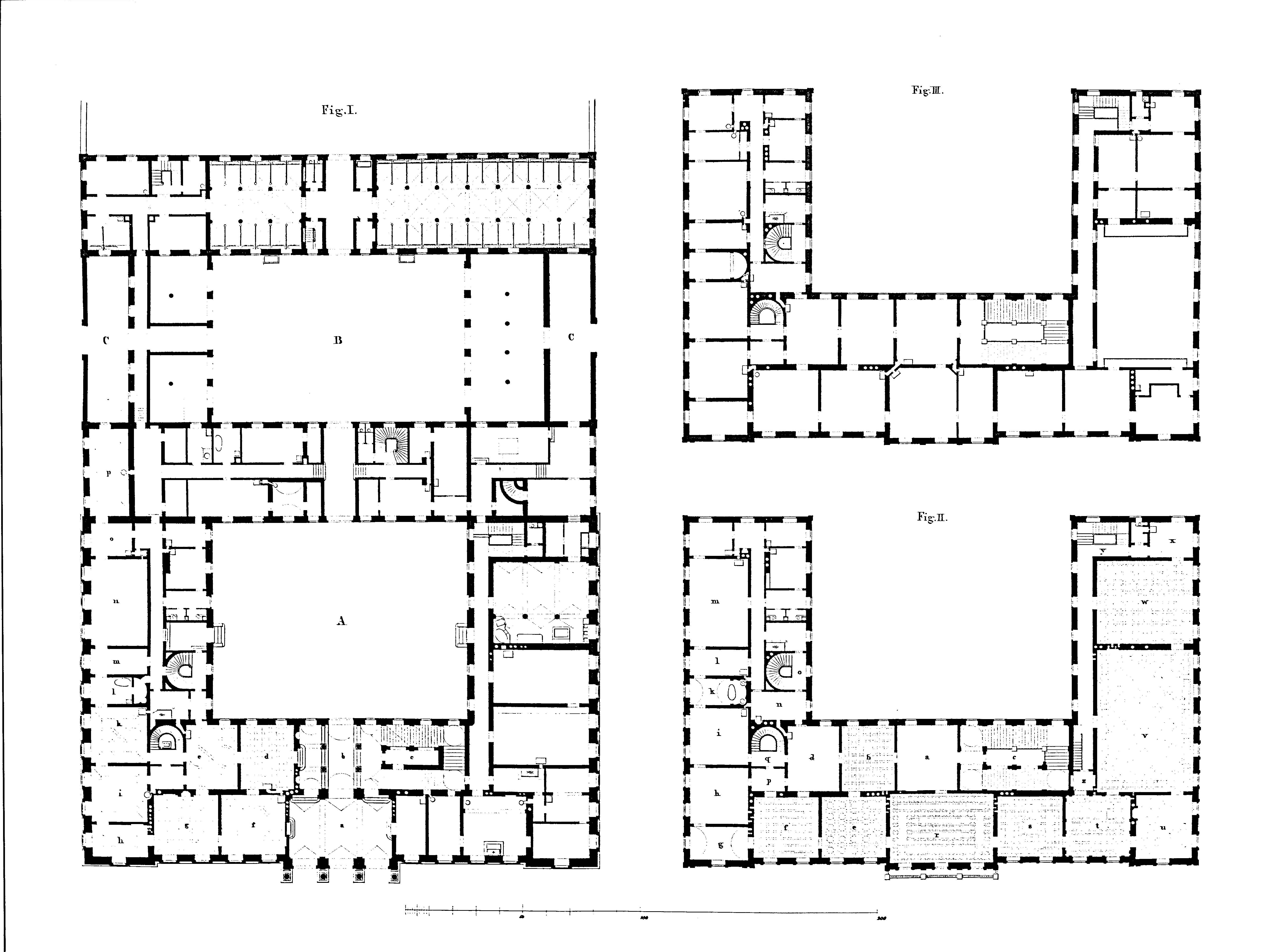 Leo von Klenze: Herzog-Max-Palais in München, Grundrisse des Erdgeschosses und der beiden Obergeschosse, 1830. Legende zu den Grundrisssen siehe hier.